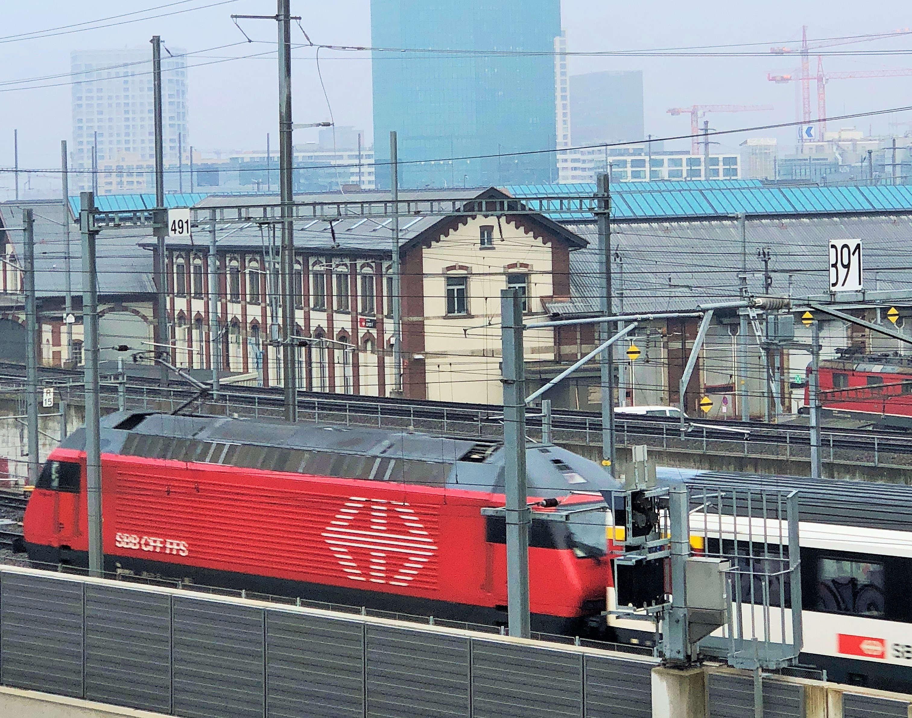 SBB Depot F, Kohlendreieck, Zürich, Schweiz, Baujahr 1898/99